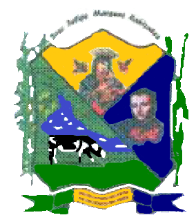 Escudo del municipio José Felipe Márquez Cañizales. Estado Trujillo. Venezuela